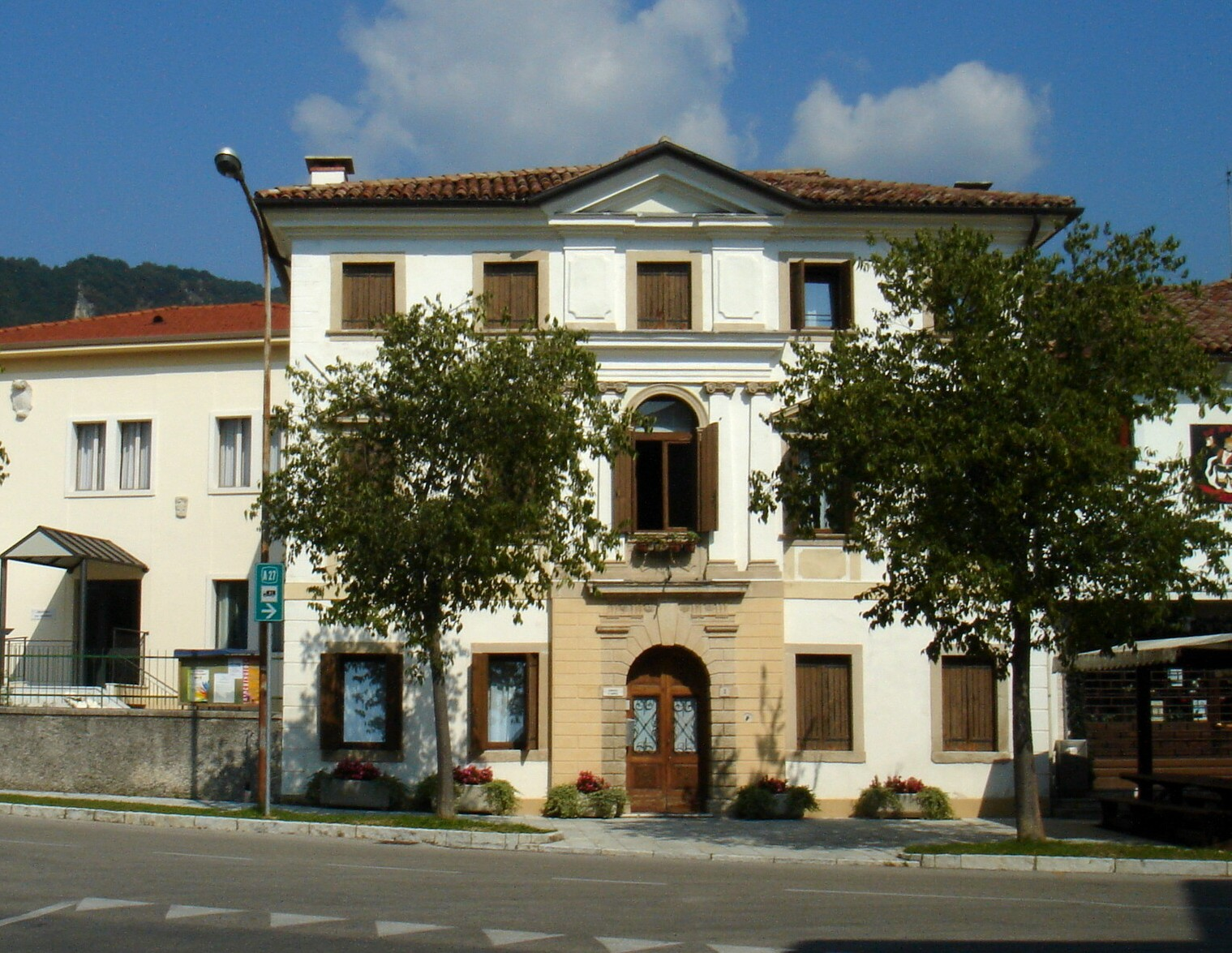 Serravalle di Vittorio Veneto (Treviso): Villa Vicentini Breda Beretta (XIX secolo), sede della parrocchia di Sant'Andrea di Bigonzo.